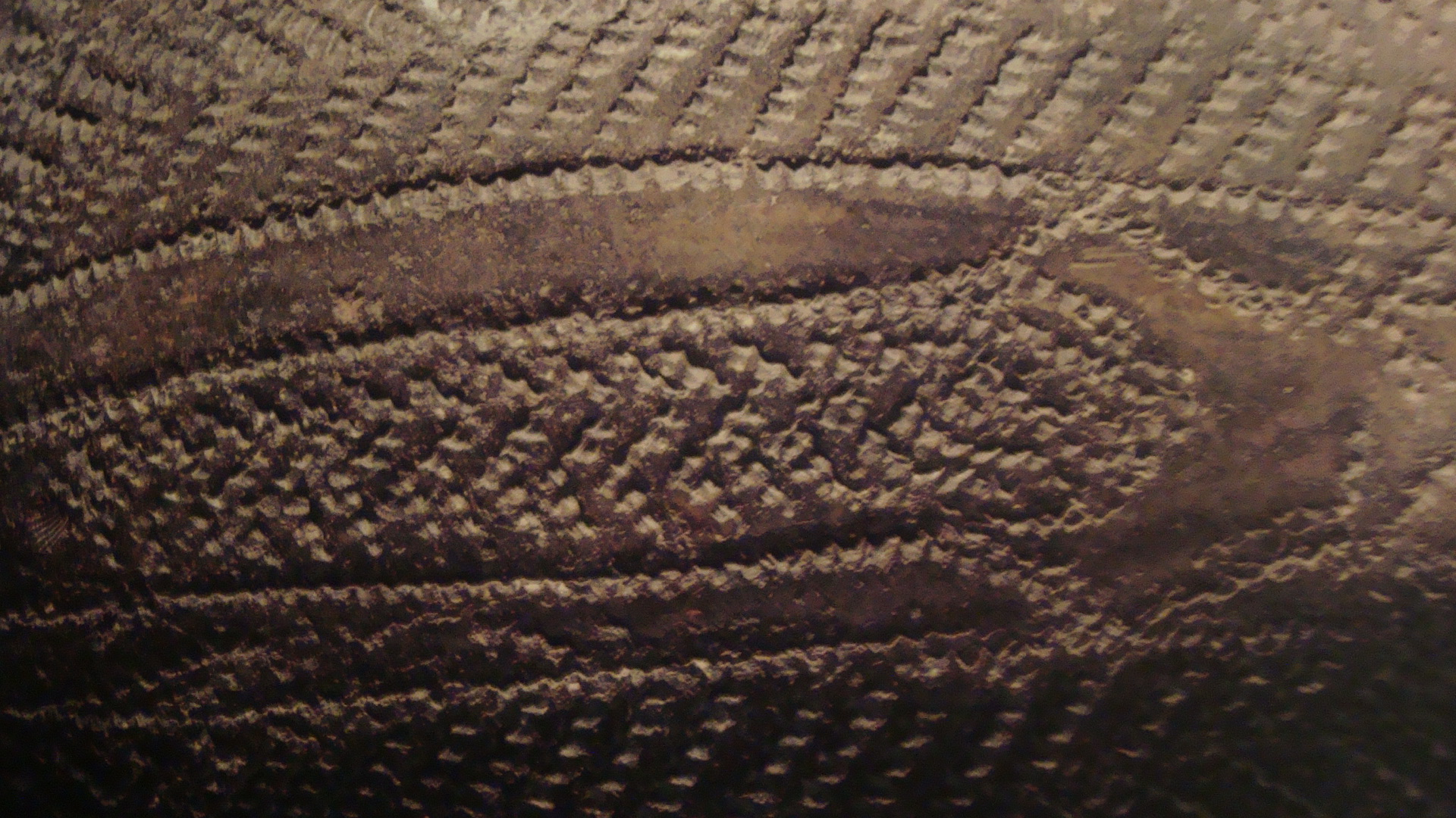 Cerámica Cardial